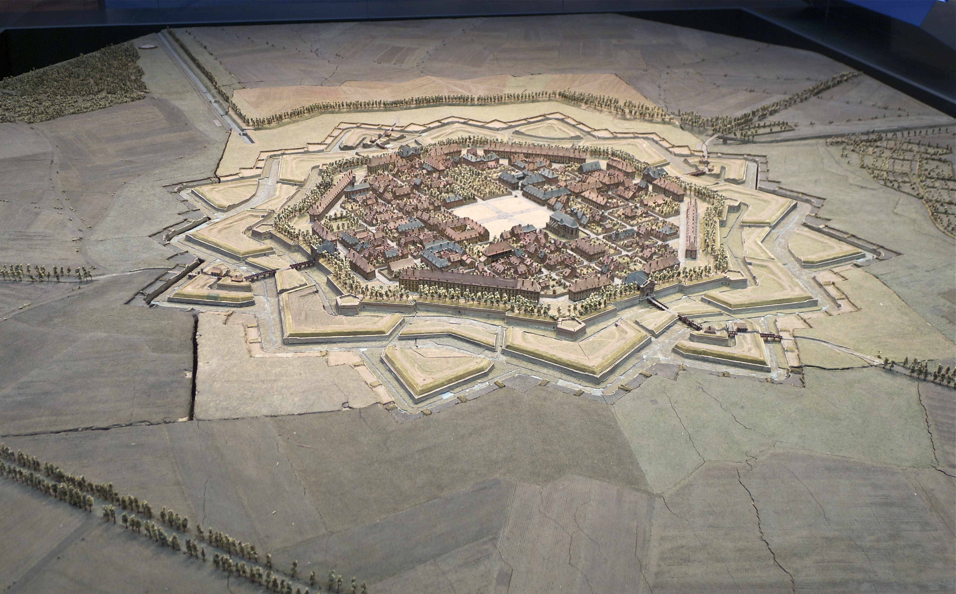 Plan-relief de Neuf-Brisach. Plan-relief construit entre 1703 et 1706. Échelle 1/600e